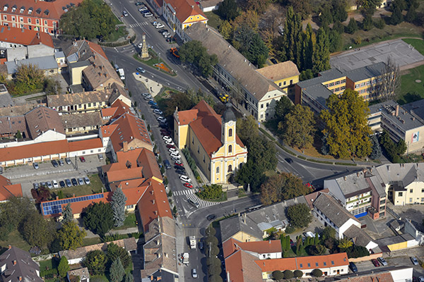 Katolikus templom légi felvételen, Bonyhád